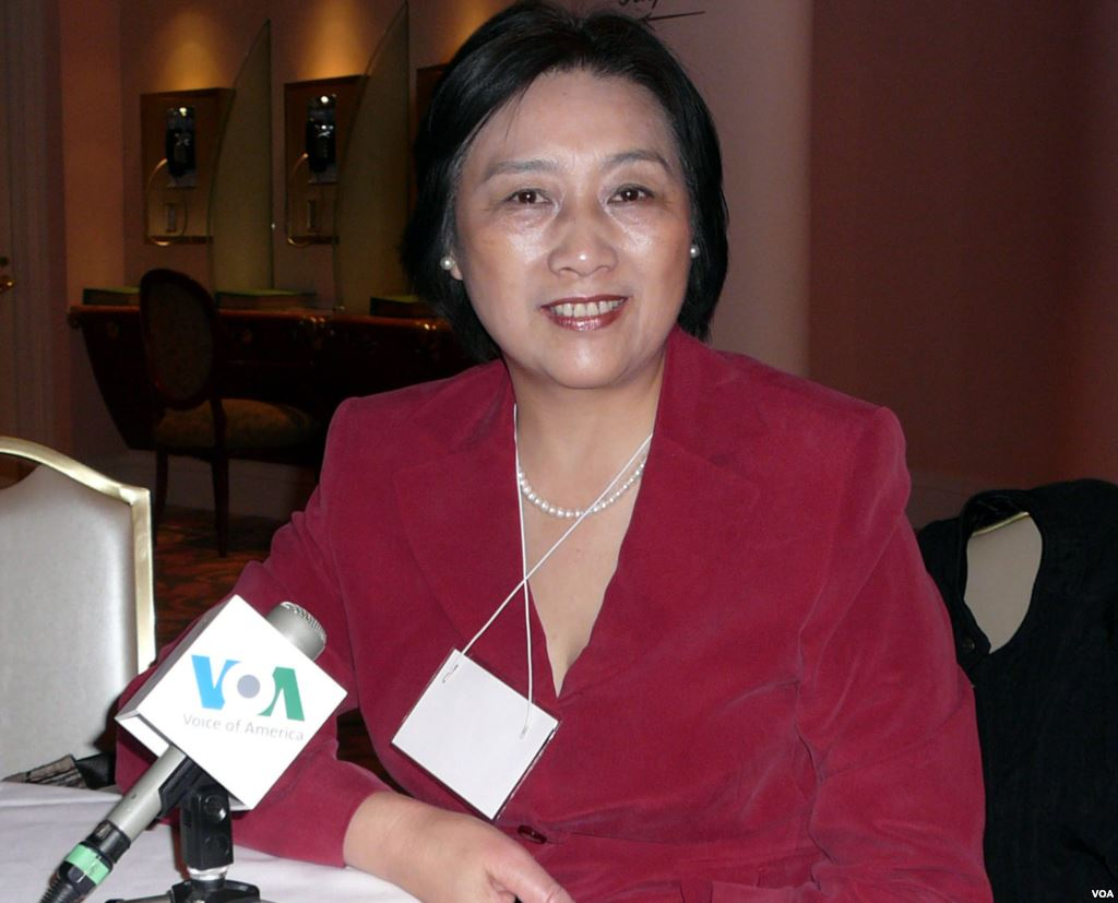 高瑜